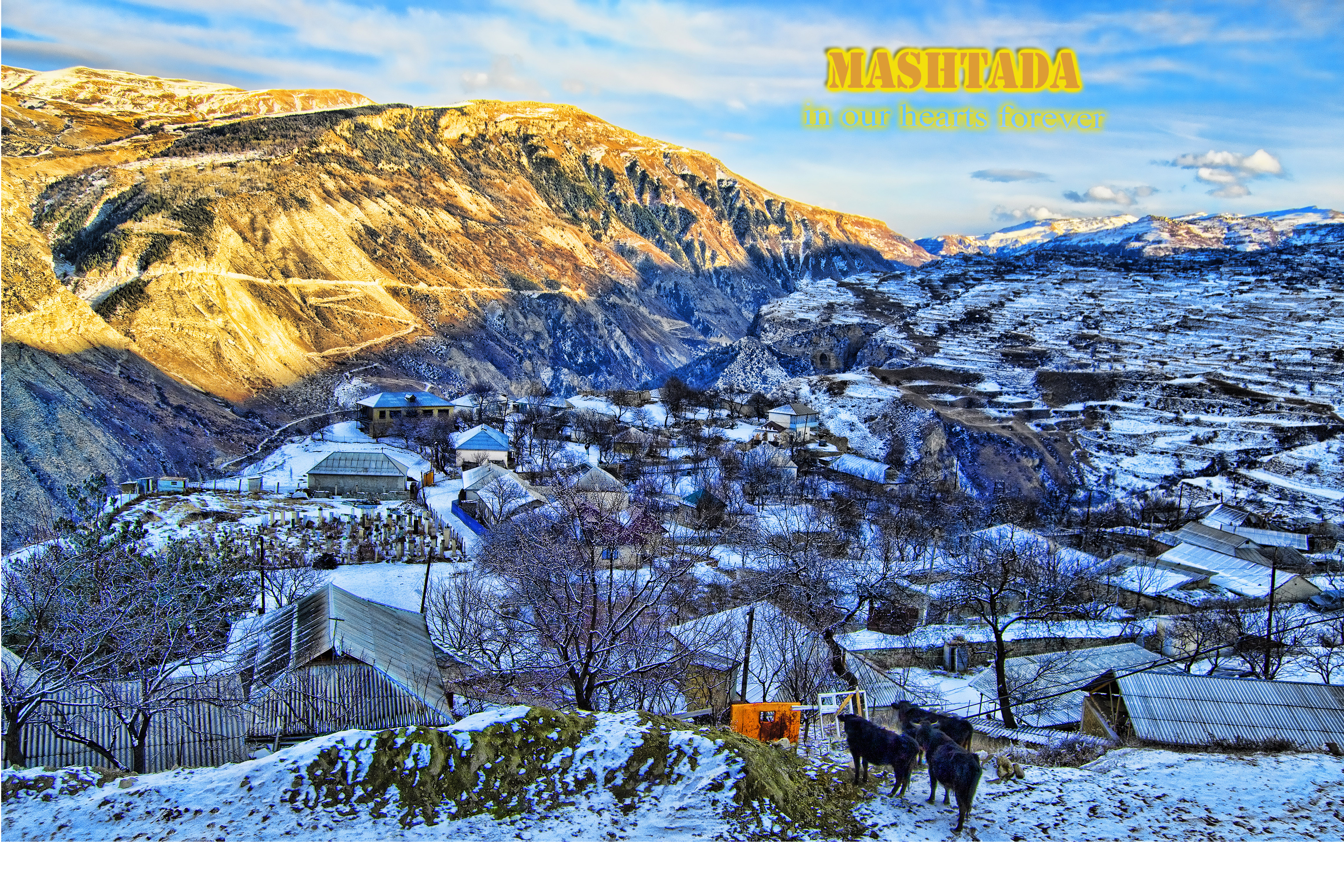 Ахвахский район селение Маштада зима январь месяц